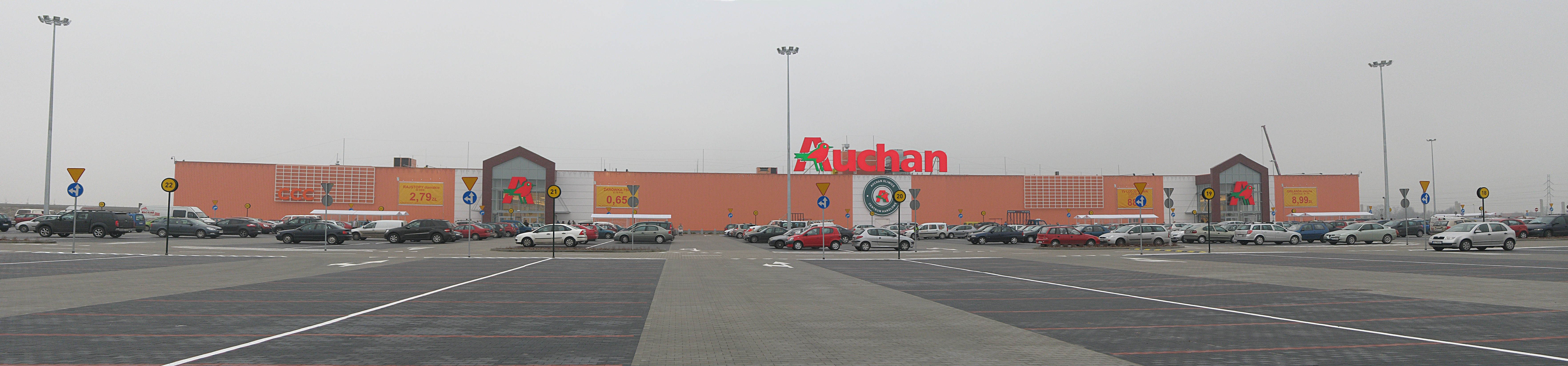 Hipermarket Auchan w Gliwicach w dniu otwarcia.